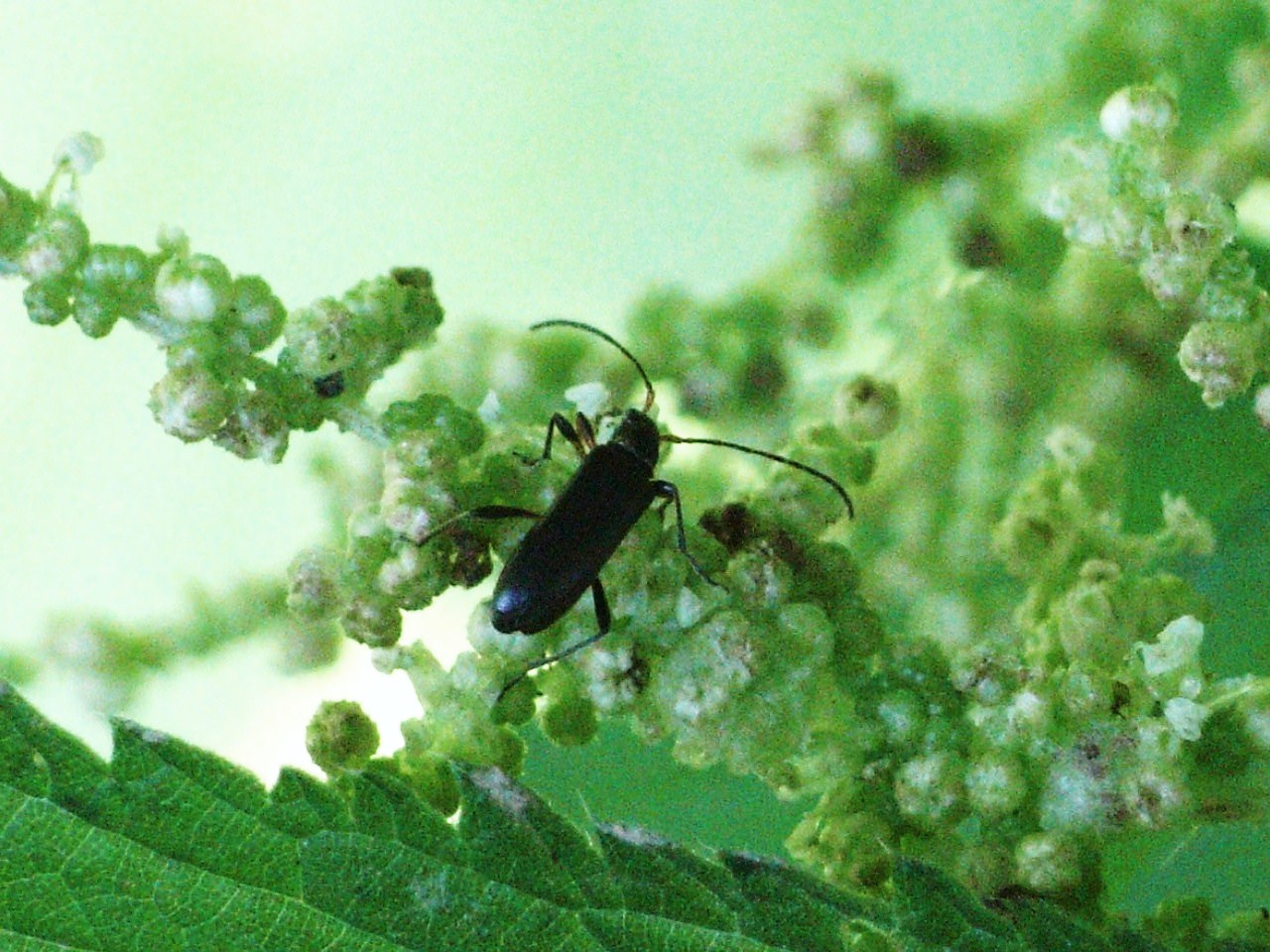 Mattschwarzer Blütenbock (Grammoptera ruficornis) auf Großer Brennnessel